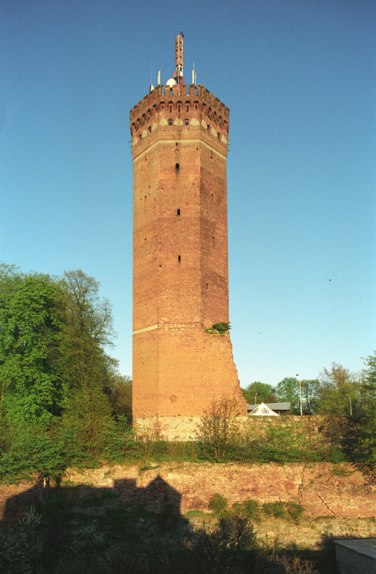 Człuchów, wieża zamkowa